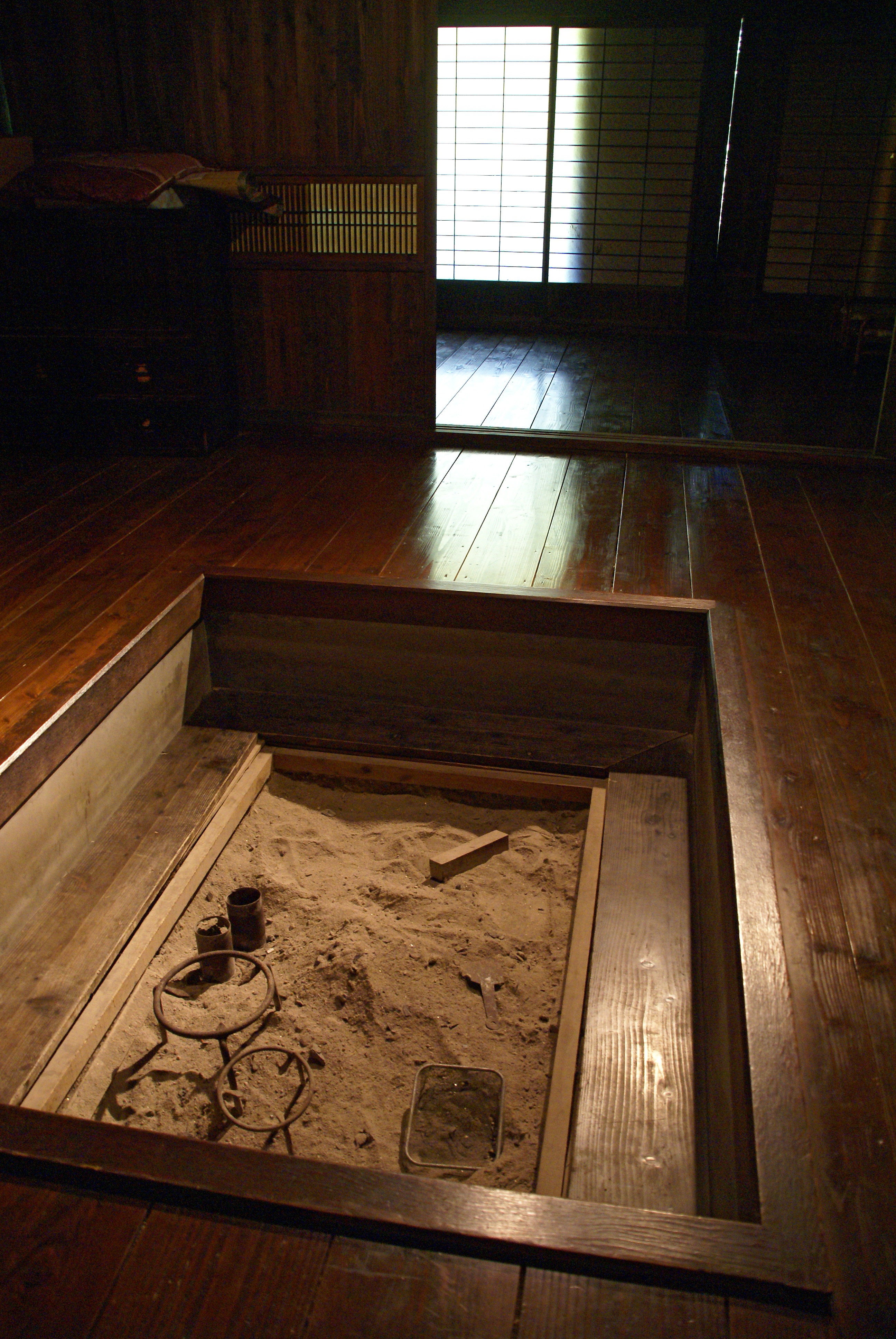 Tono Furusato-mura in Tono, Iwate prefecture, Japan